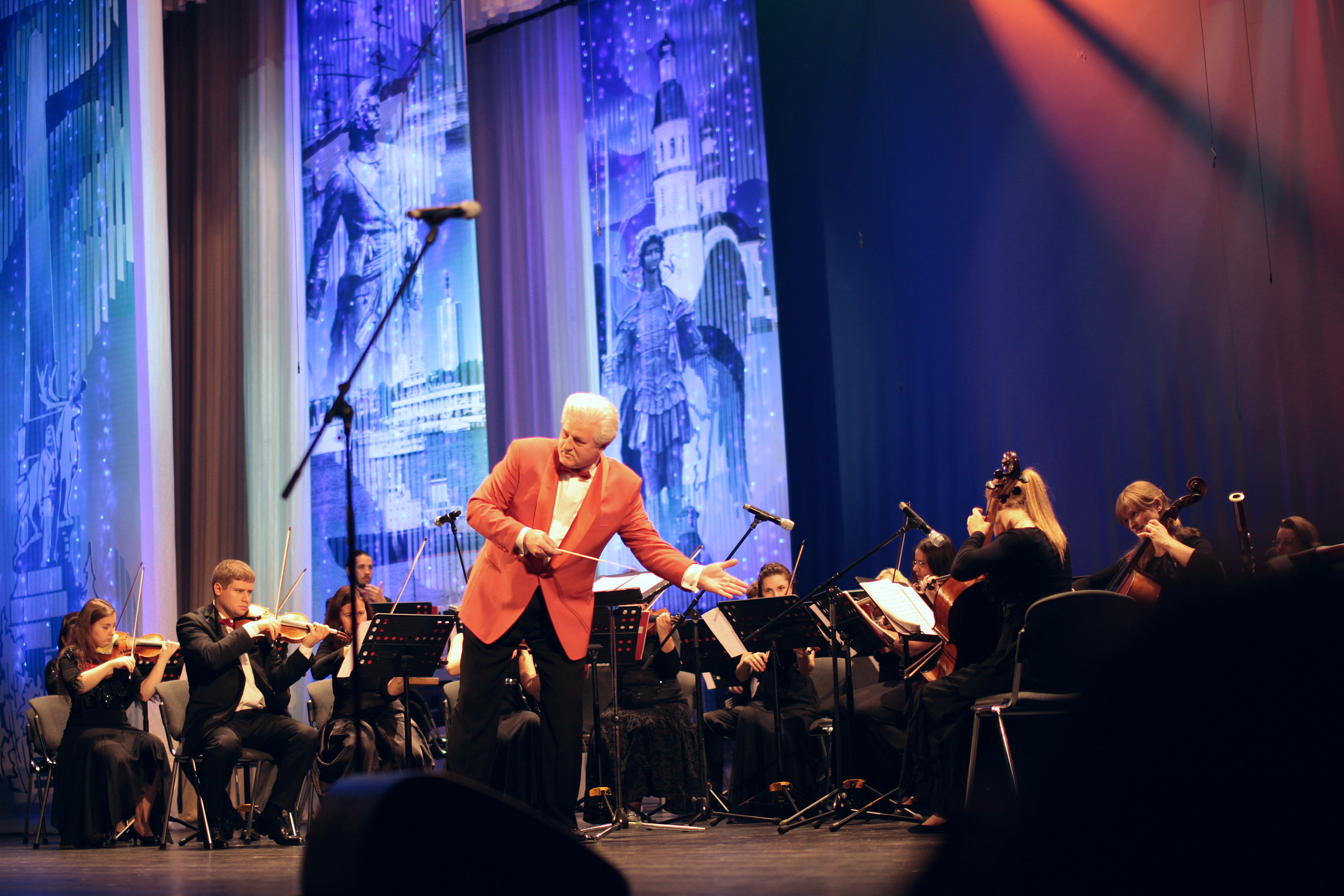 «Глобалис» — российский симфонический оркестр. Дирижёр Павел Овсянников